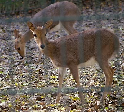 Redunca fulvorufula fotografiert im Tierpark Berlin, Juli 2005